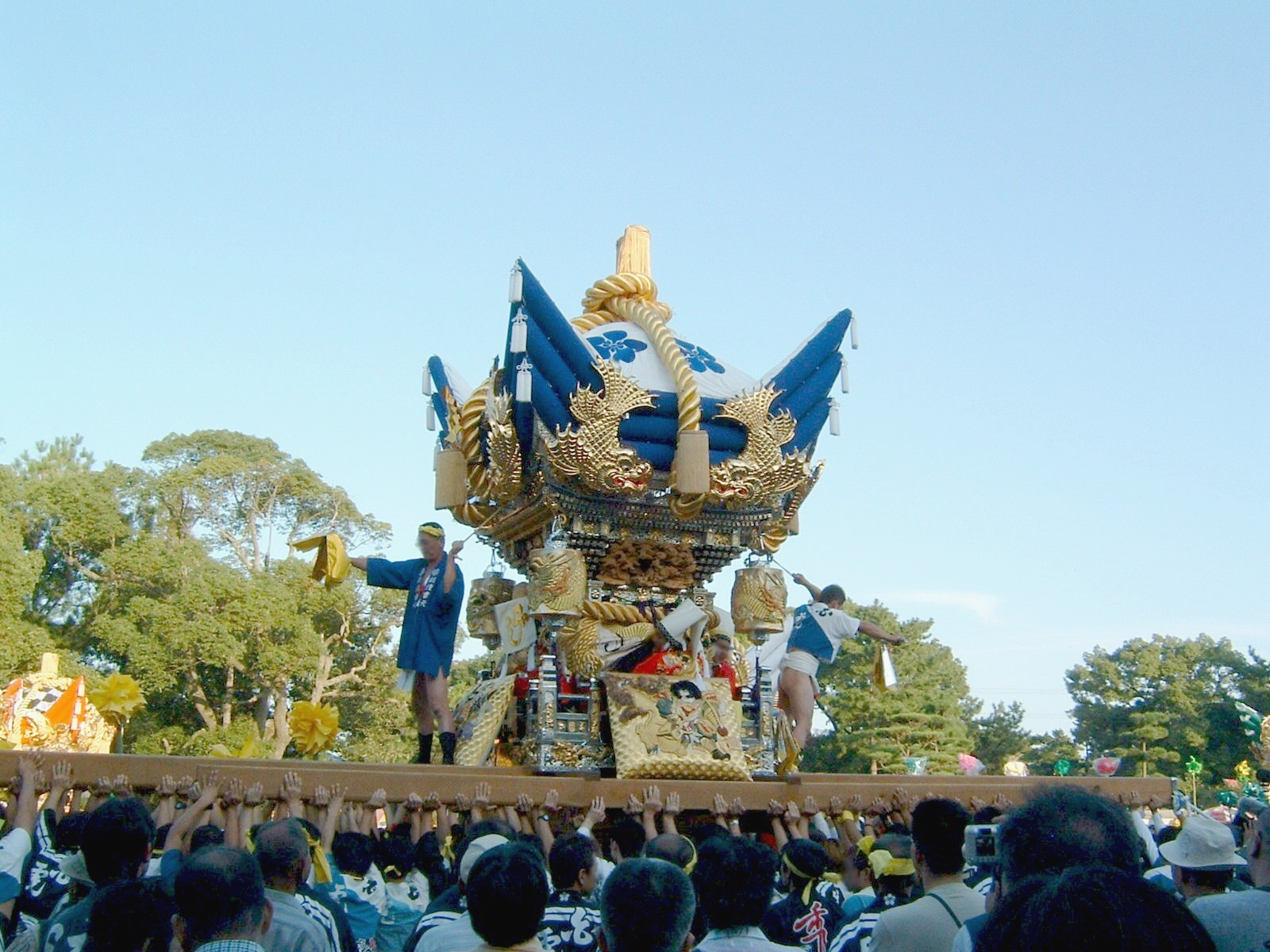 Sone-tenmangu autumn festival